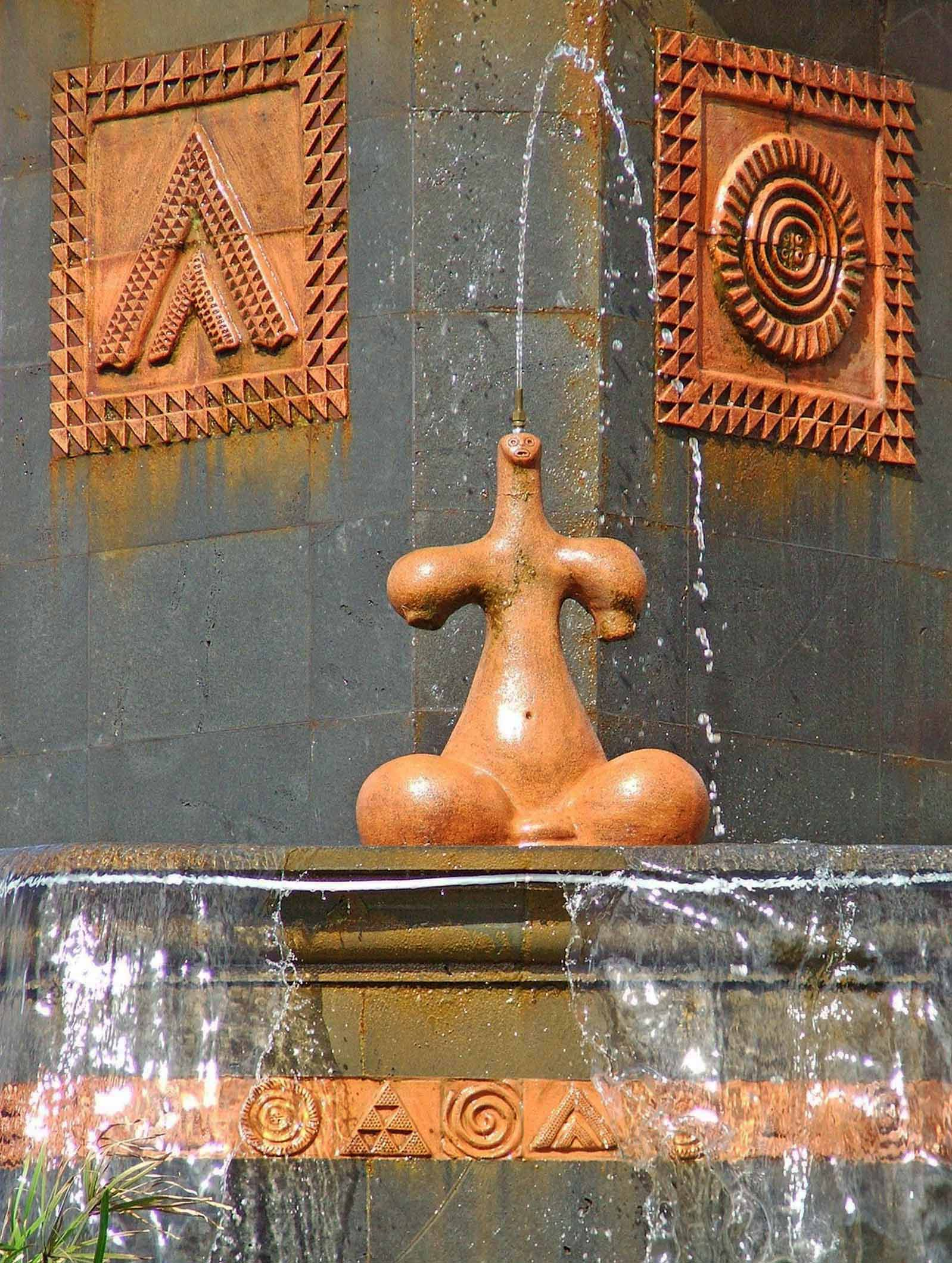 Fuente de la Princesa Dácil situada en la vía de entrada a La Orotava por El Ramal / Estatua creada por los artistas Ezequiel de León Cruz y Cristo Quintero. Decorado con pintaderas de Gran Canaria y cuatro copias del ídolo grancanario de Chil